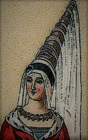 raffigurazione della giudicessa regnante di Gallura Elena di Lacon (dal 1203 al 1218) (Sardegna)